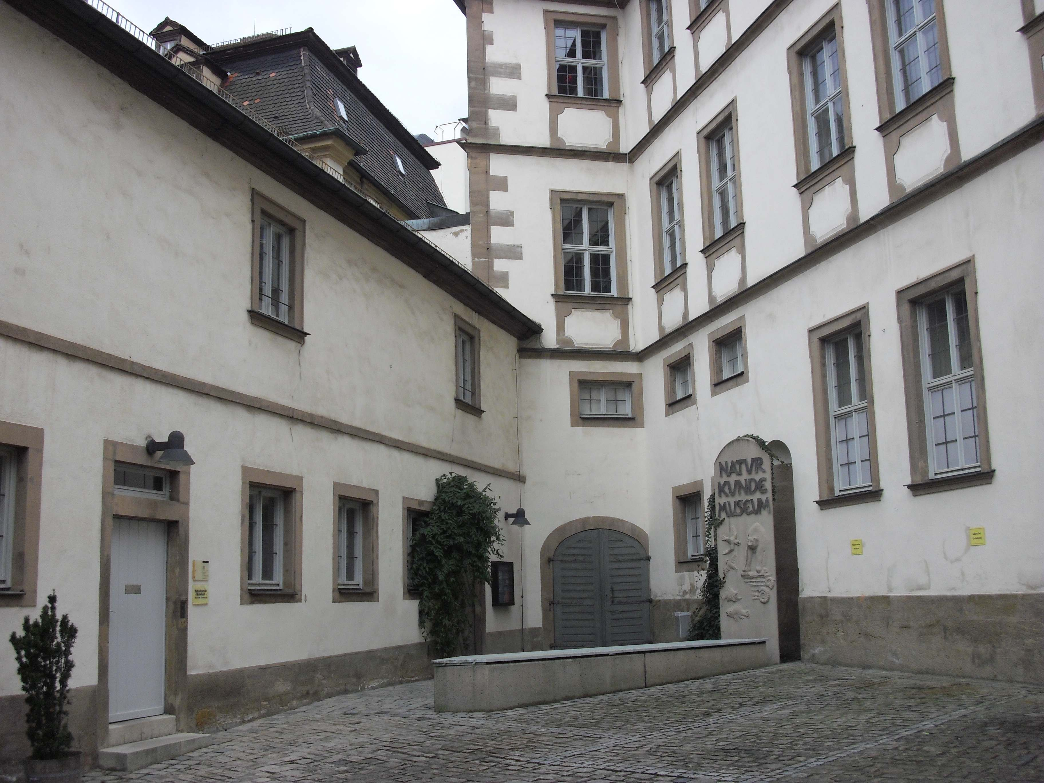 Eingang zum Bamberger Naturkundemuseum